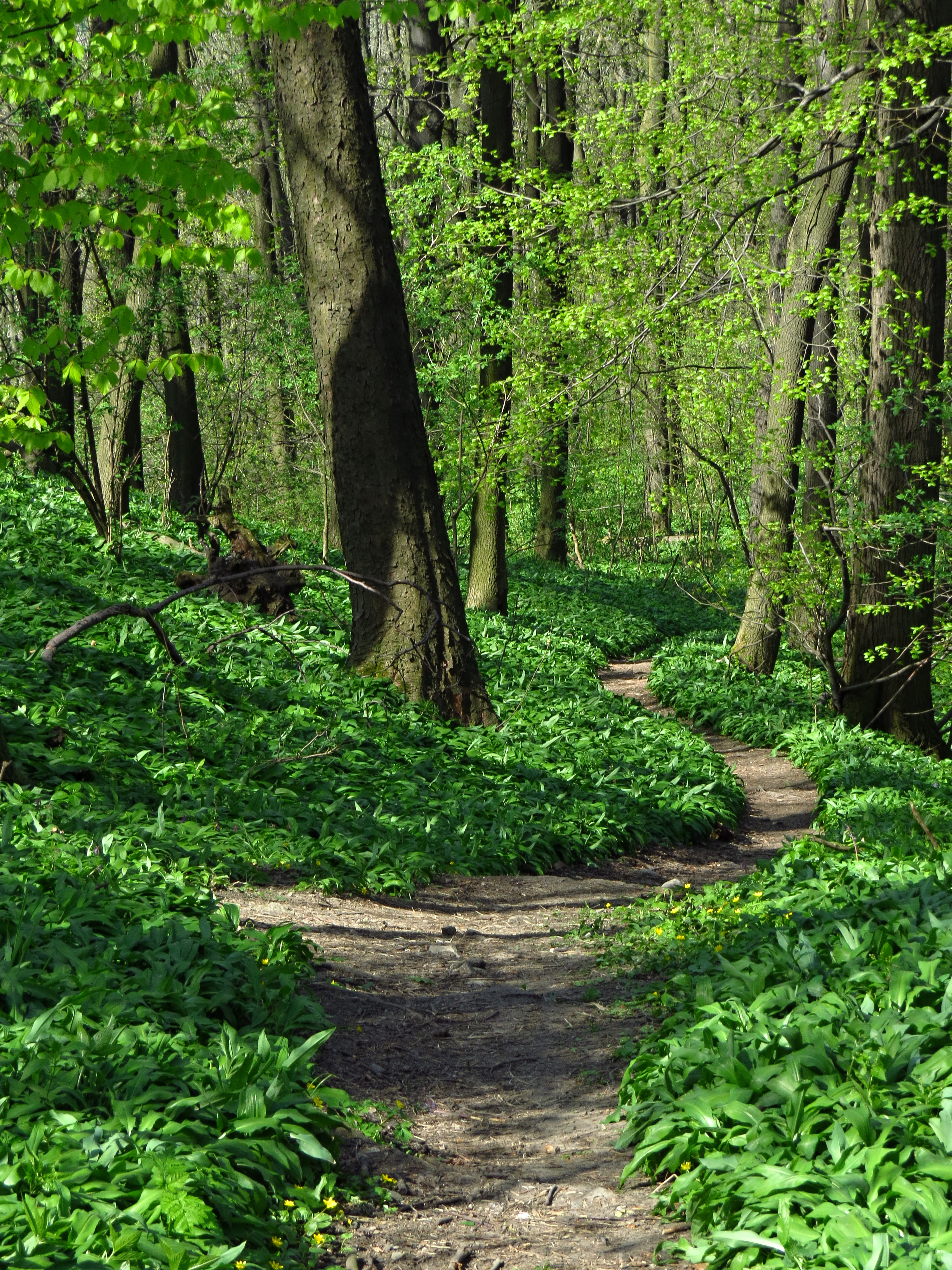 Les na severním svahu